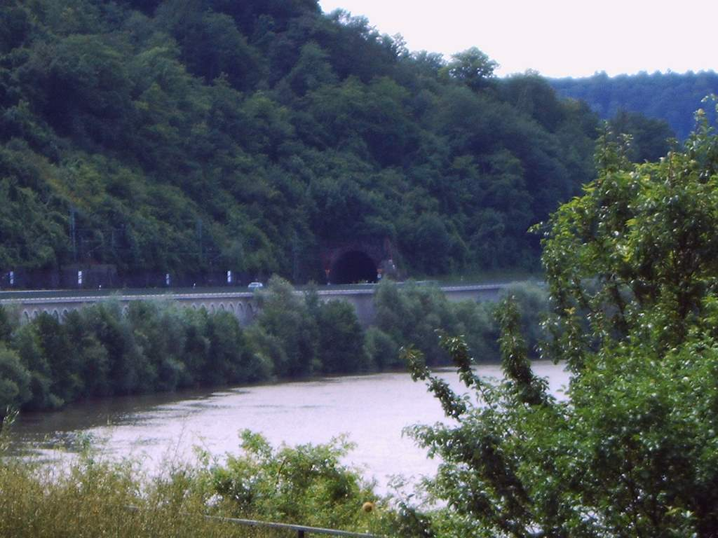 In diesem Bahntunnel bei Gundelsheim befand sich ein, heute vermauerter, getarnter Eingang für in der Nähe liegende Bunkeranlagen (Bunker 44) der Neckar-Enz-Stellung.